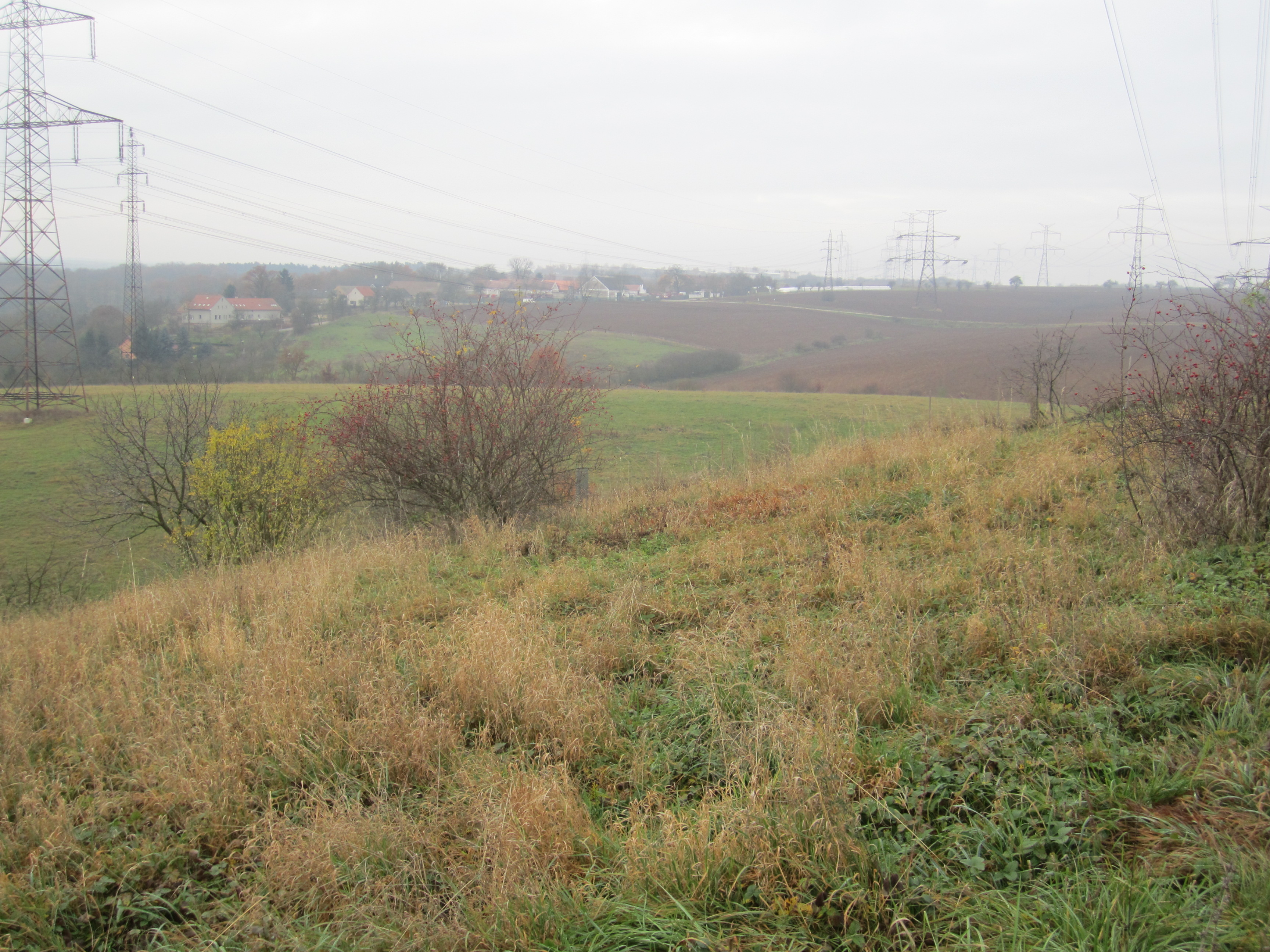 Křoviny